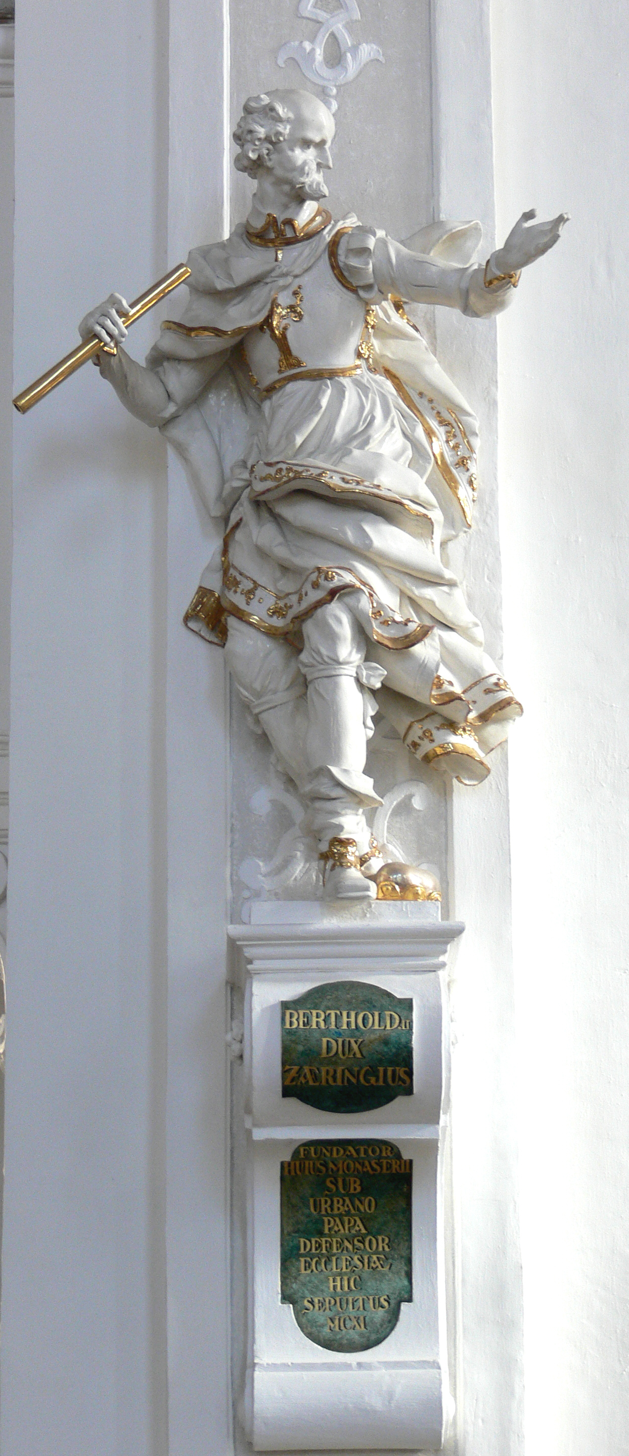 Pfarrkirche St. Peter (ehem. Klosterkirche St. Peter auf dem Schwarzwald) Joseph Anton Feuchtmayer: Stifterfigur Berthold II. von Zähringen, im Langhaus, 1731 Joseph Anton Feuchtmayer (1696–1770) Description German sculptor Date of birth/death6 March 16962 January 1770Location of birth/deathLinzMimmenhausen bei Salem (Baden)Work locationOberschwabenAuthority control VIAF: 69721226 LCCN: n84189350 GND: 118532707 ULAN: 500032217 ISNI: 0000 0000 6678 5681 WorldCat WP-Person